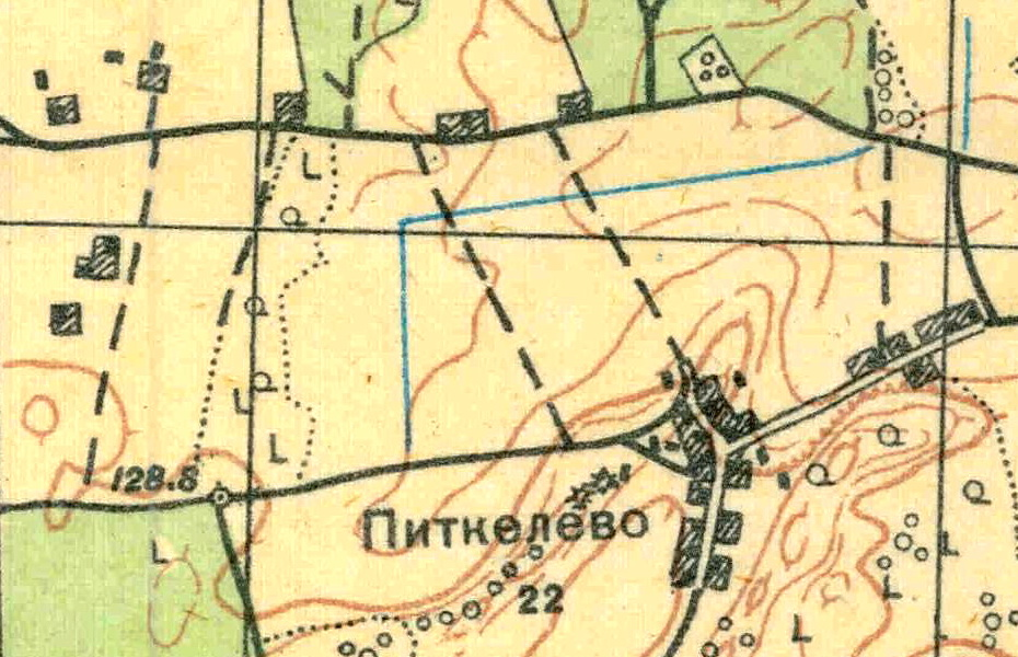 Топографическая карта Ленинградской области, квадрат О-35-24-Б-г (Б. Борницы), деревня Питкелево